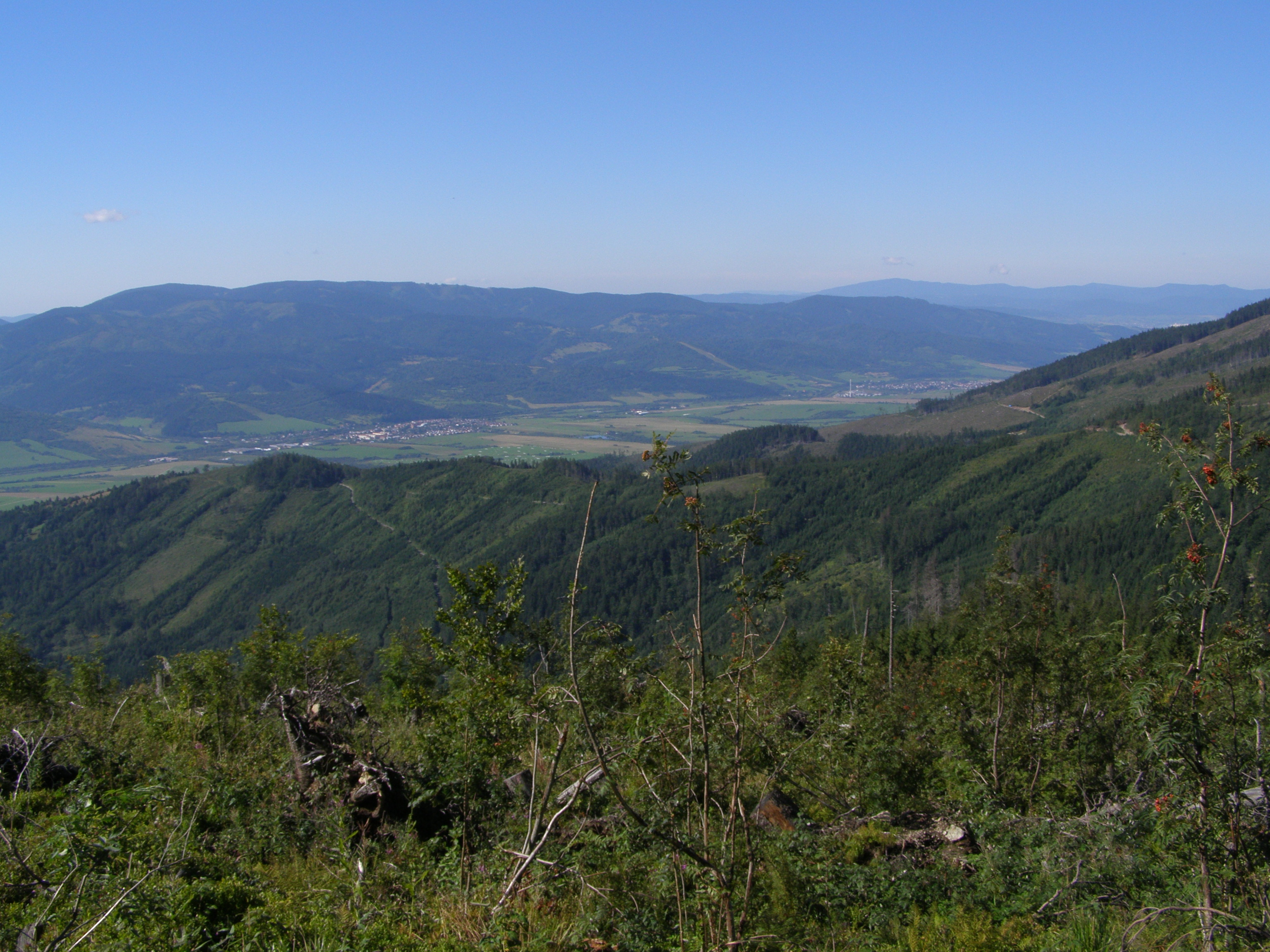 Nízké Tatry, Kráľovohoľské Tatry, pohled ze západního úbočí vrcholu Veľká Vápenica na jihozápad: v popředí jižní svahy vrcholu Kolesárová (1508 m), za ní Horehronské podolie (zleva obce Závadka nad Hronom, Hámor] a Polomka), v pozadí Slovenské rudohoří (Fabova hoľa)